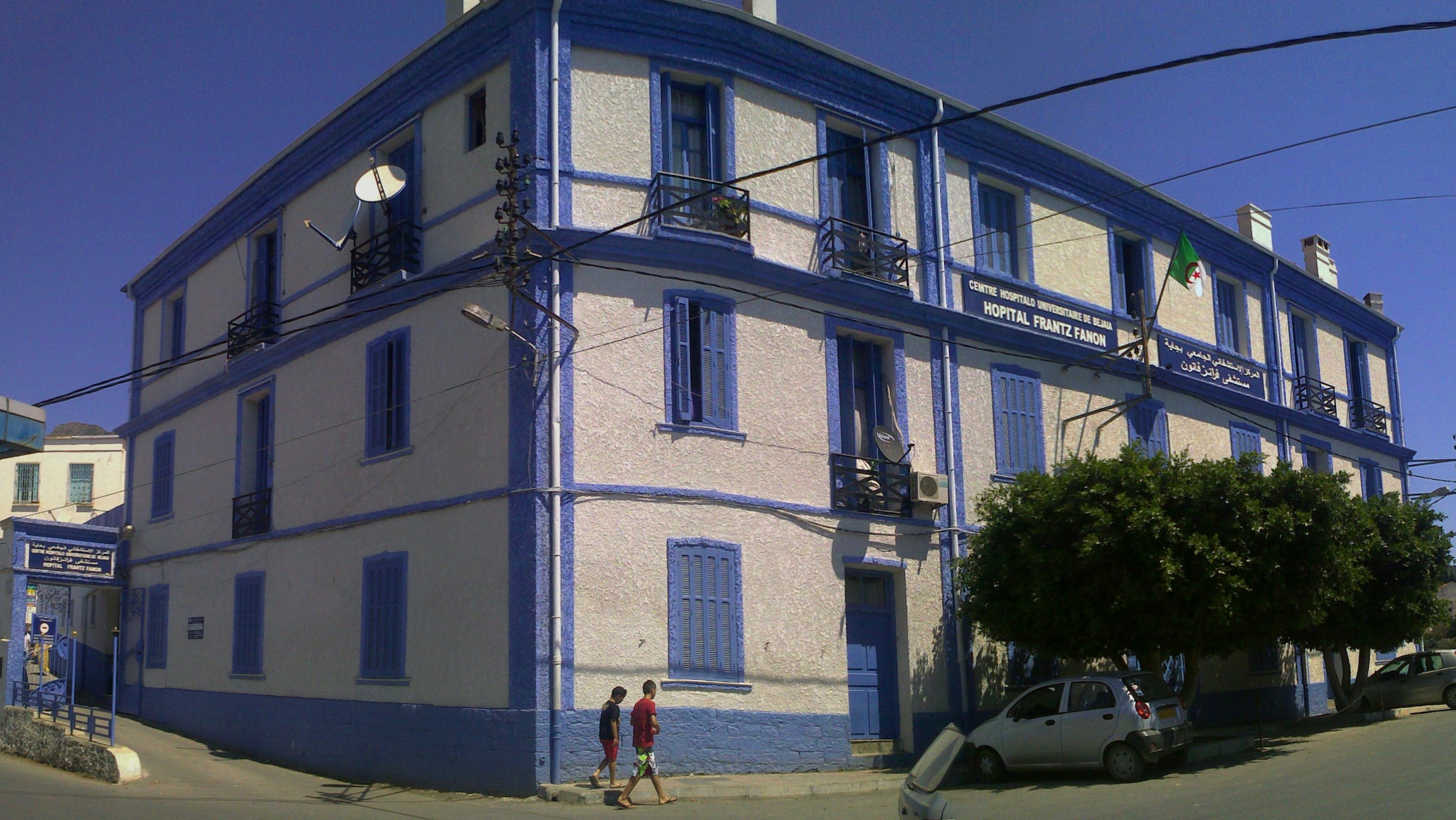 Hopital Frantz Fanon dans la ville de Bejaia